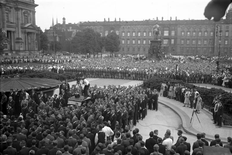 Eine Kundgebung gegen den Versailler Vertrag im Lustgarten in Berlin ! Blick auf die Kundgebung gegen das Versailler Diktat im Lustgarten in Berlin.